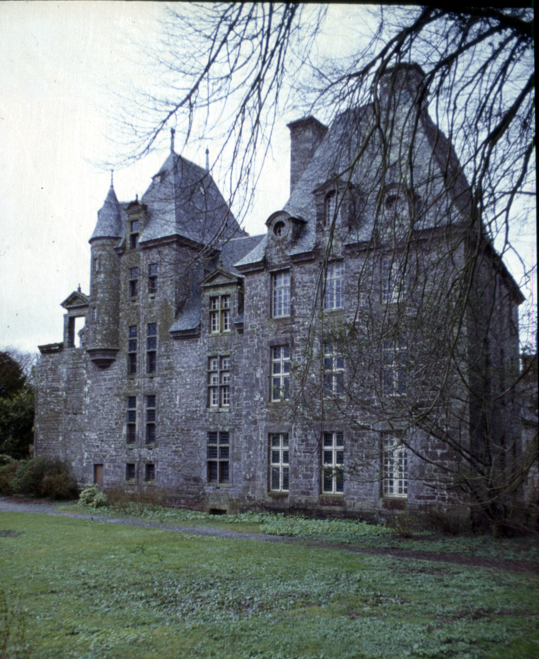 Château de Kerjean, 1978